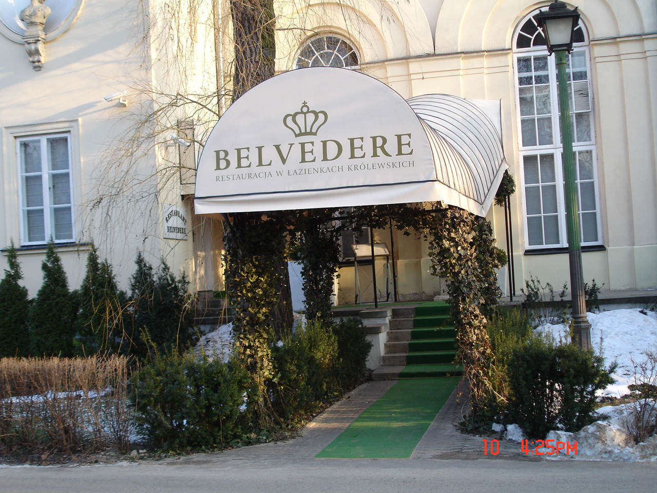 Wejście do restauracji Belweder.